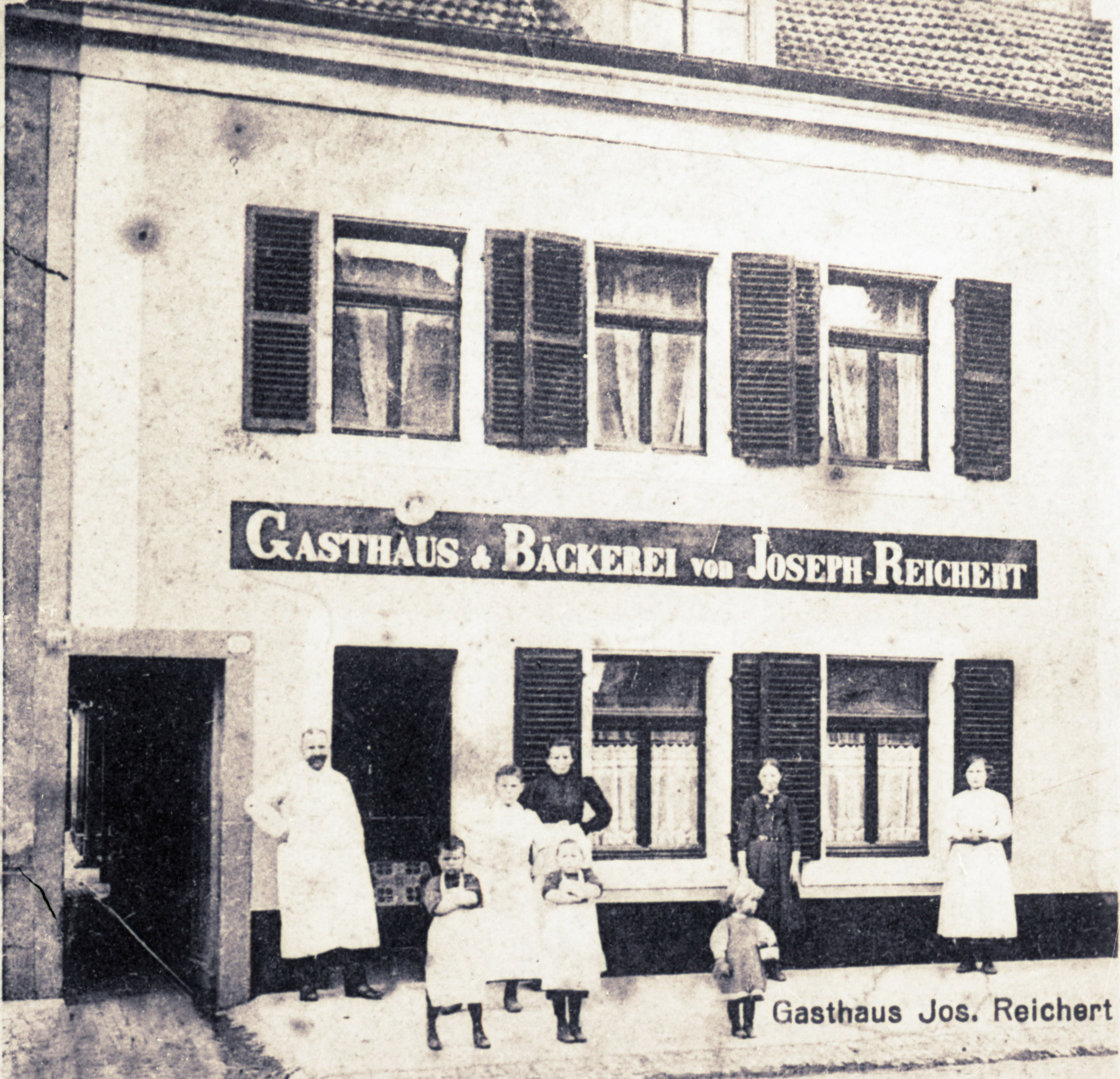 Gasthaus und Bäckerei Joseph Reichert, Hauptstraße 110 in Beaumarais (Saarlouis)